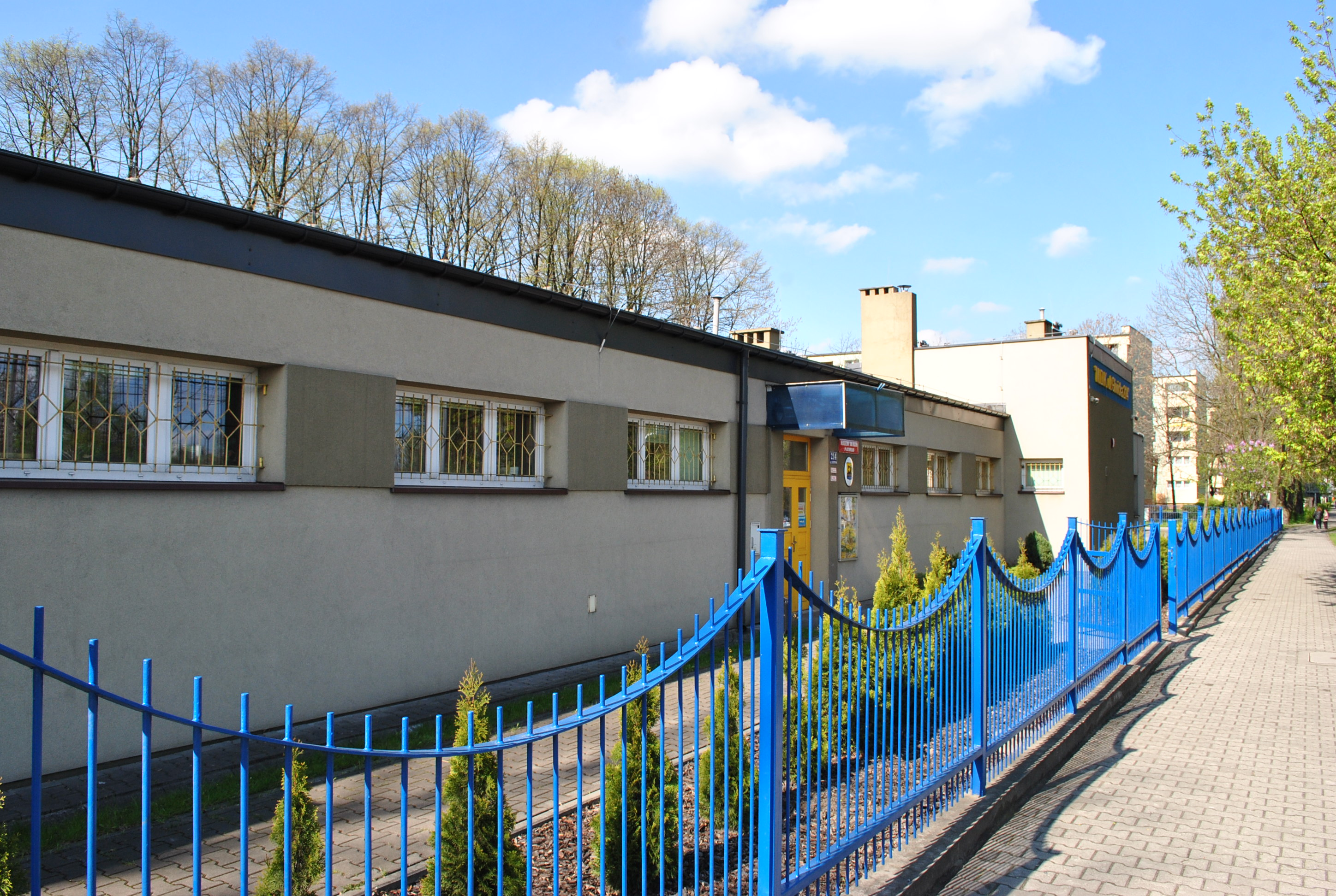 Katowice - Załęże. Młodzieżowy Dom Kultury przy ul. Gliwickiej 214